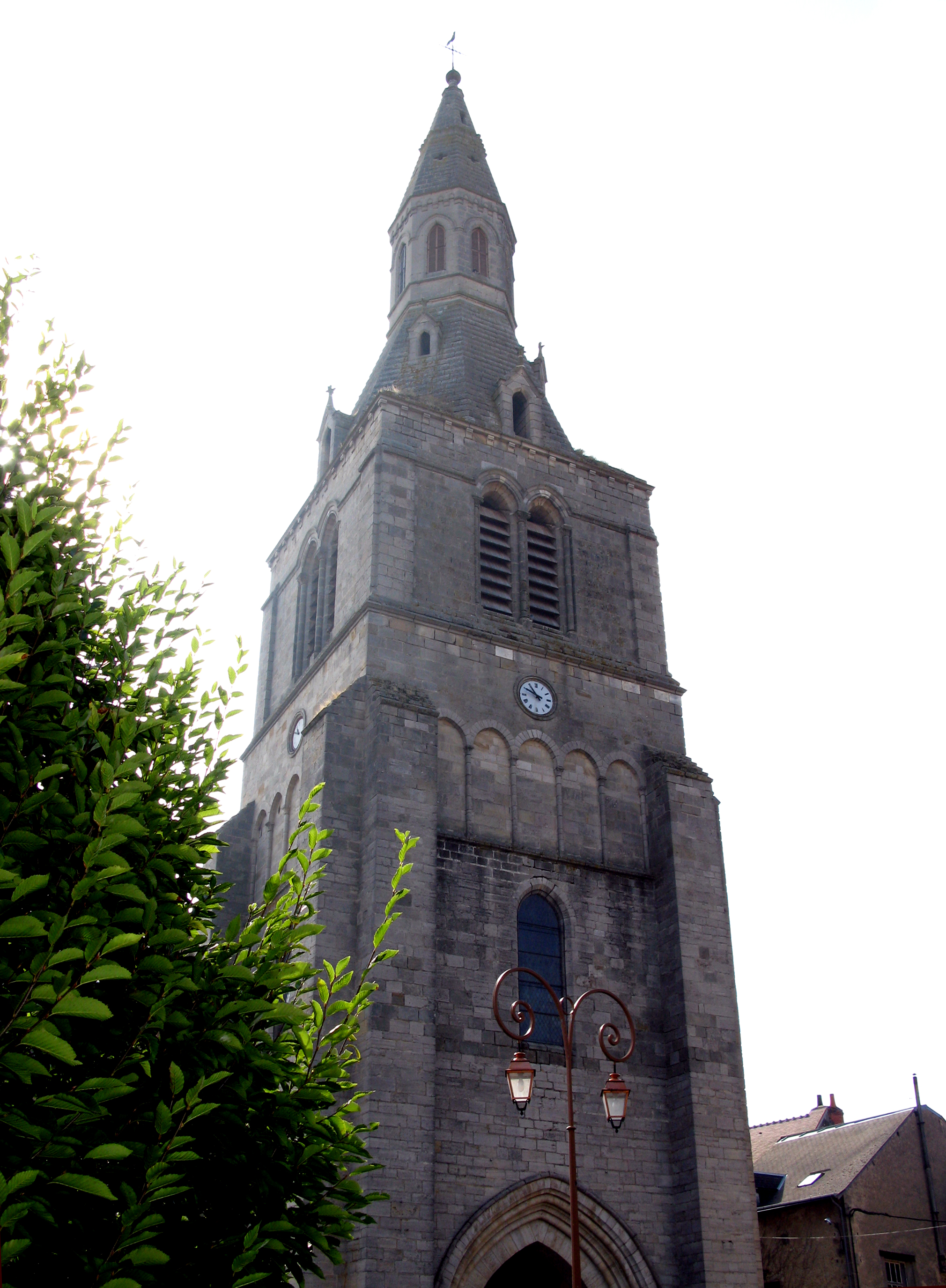 La Châtre (Indre, France) - Le clocher de l'église Saint-Germain. . .